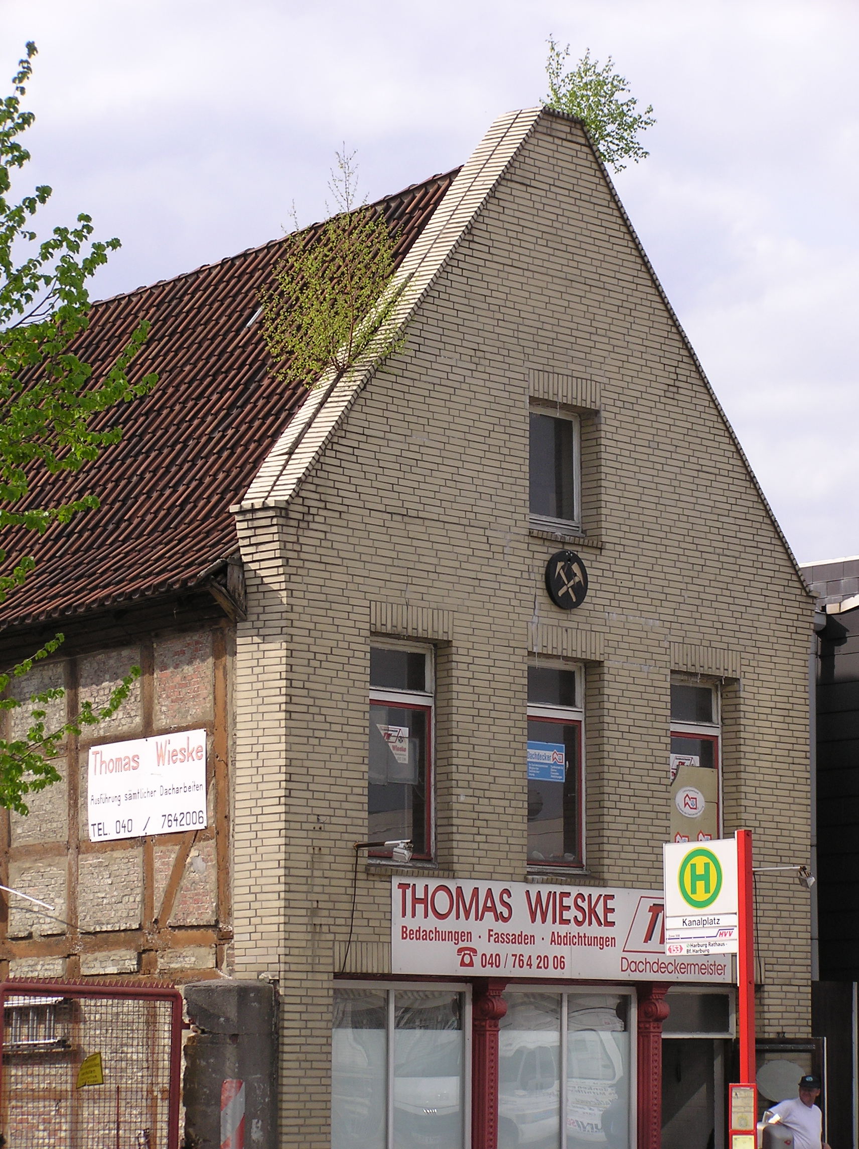 Sign